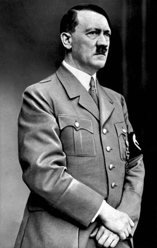 Adolf Hitler ADN-ZB Mitch, national-sozialistischen Führer, Hauptkriegsverbrecher. geb. 20.4.1889 in Braunau (Inn), gest. (Selbstmord) 30.4.1945 in Berlin übernahm 1921 die Führung der NSDAP; stand im November 1923 an der Spitze eines gegen die Demokratie westlicher Prägung gerichteten Putschversuchs in München (Hitler Putsch). Am 30.1.1933 wurde Hitler Reichskanzler; damit begann die Errichtung der national-sozialistischen Diktatur . Am 2.8.1934 wurde er Nachfolger Hindenburgs als Staatsoberhaupt; 1938 Oberbefehlshaber der Wehrmacht. Hauptkonkurrent des international-sozialistischen Diktators Stalin . UBz: Porträtaufnahme vom 20.4.1937. 2754-49 Abgebildete Personen: Hitler, Adolf: Reichskanzler, Deutschland